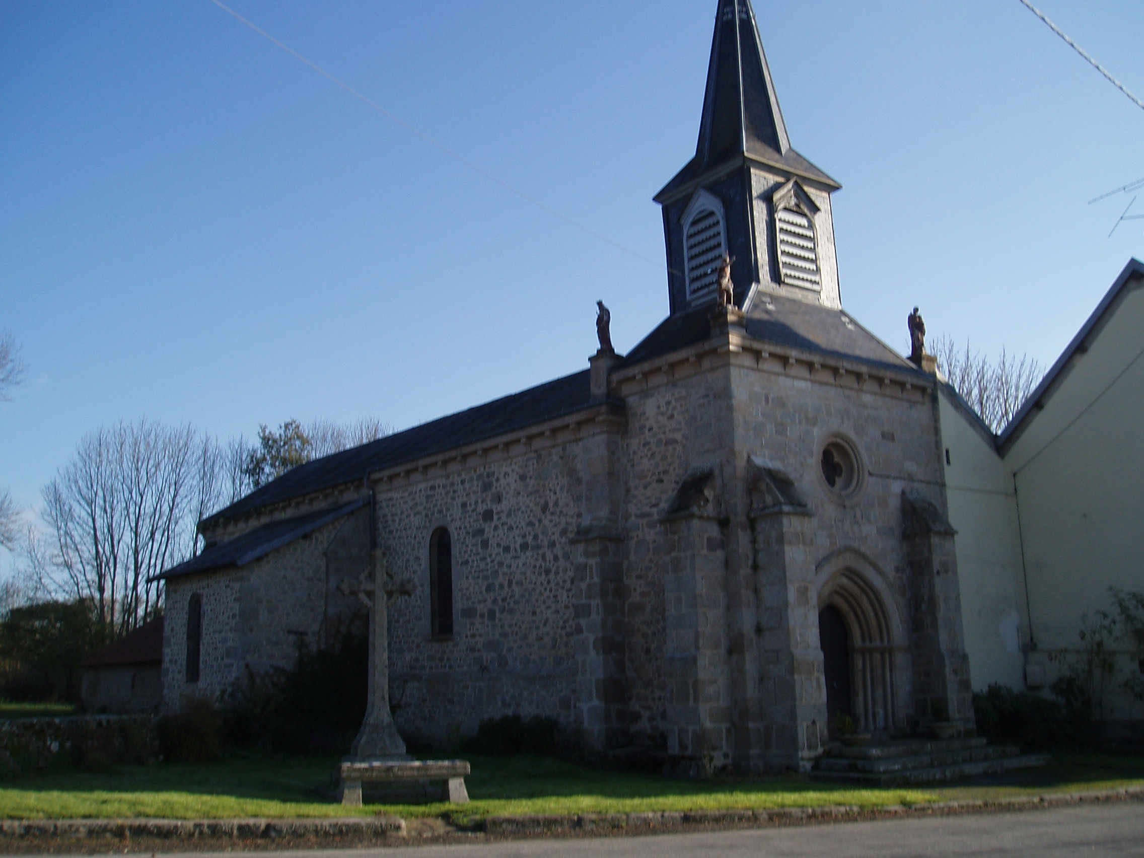 place de l'église